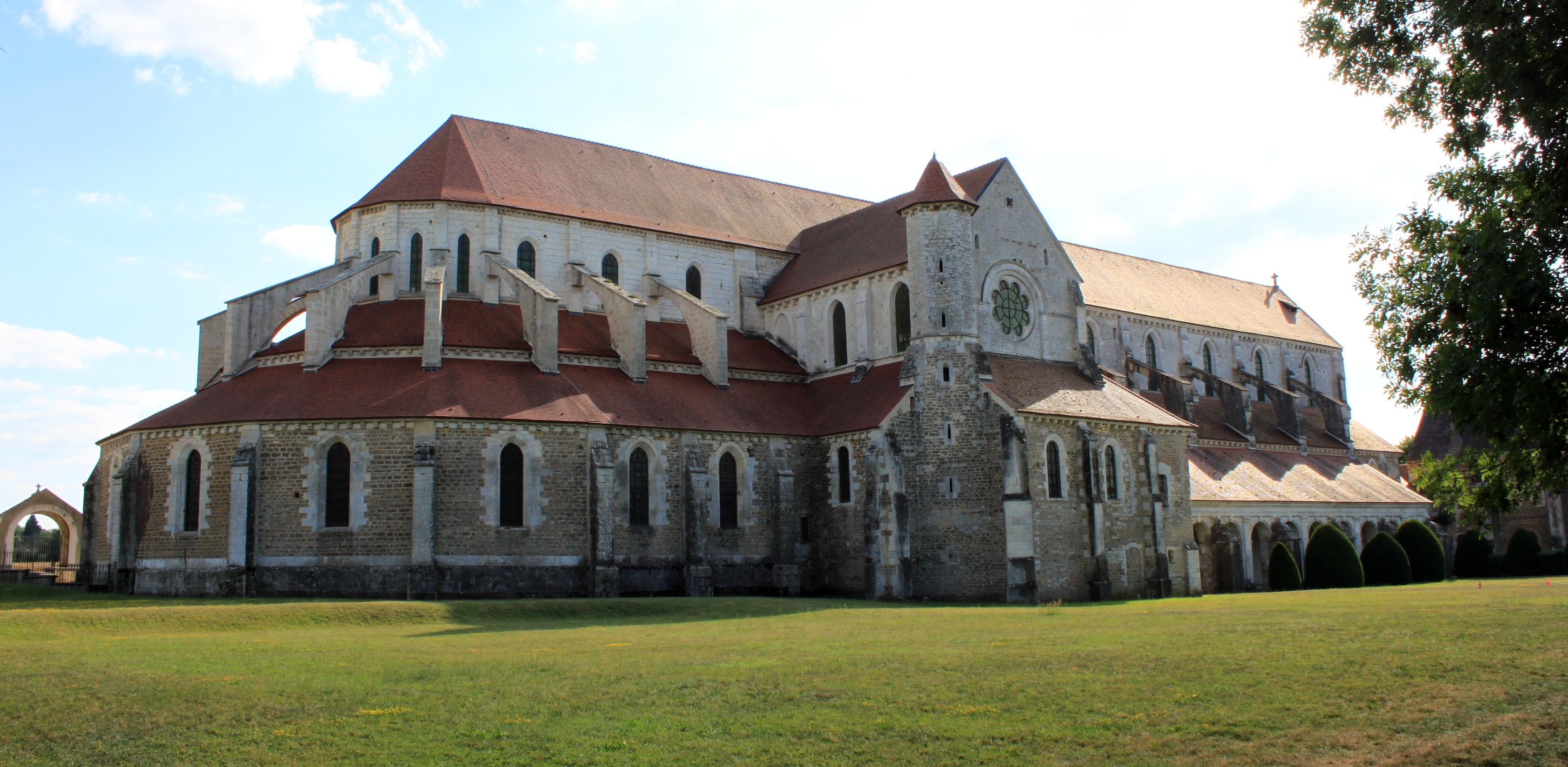 Abbaye de Pontigny, Yonne, Bourgogne, France